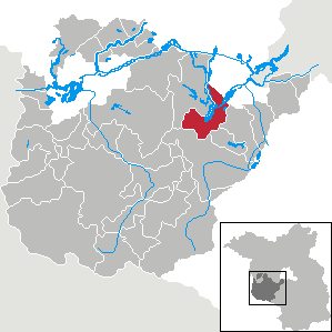 Schwielowsee in Brandenburg (Country) - District Potsdam-Mittelmark